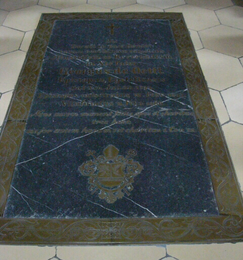 Grabplatte des Bischofs Georg von Oettl am Boden des Eichstätter Domes